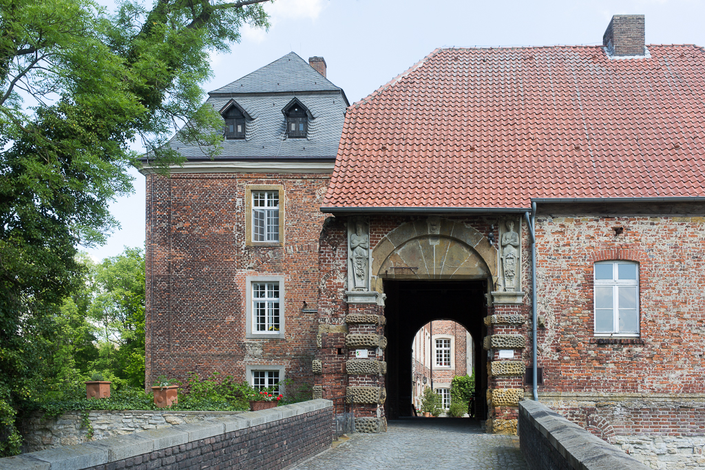 Haus Geist, Oelde, 2019